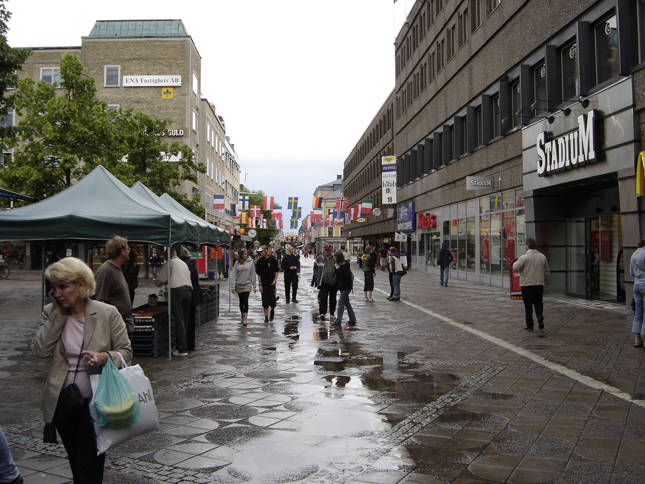 Gävle